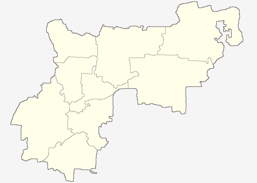 Карта административного деления Тихвинского района Ленинградской области